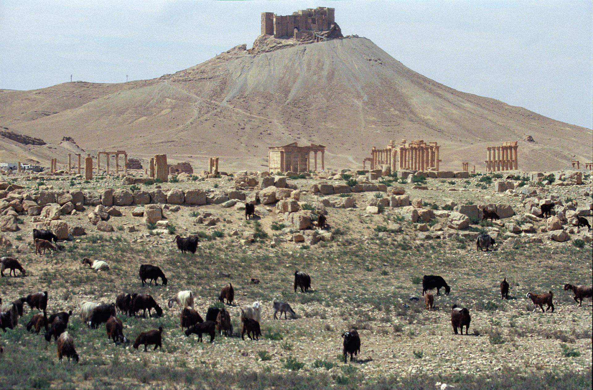 Palmyra, qalat ibn maan